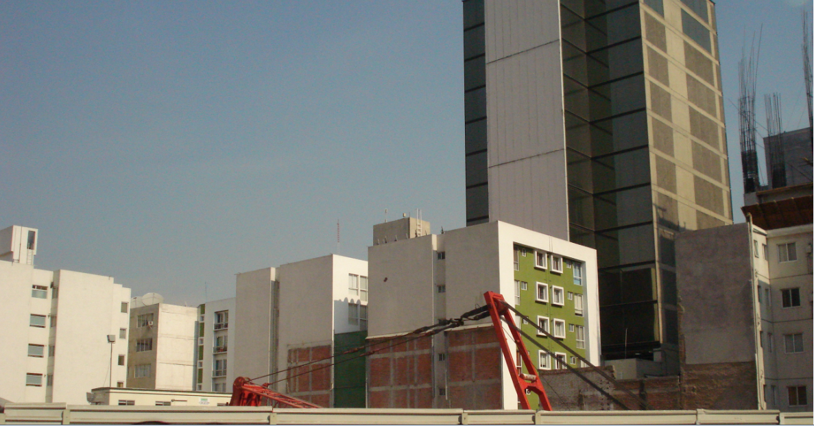 Predio en el cual se está construyendo el edificio Mapfre en el predio Reforma 243 en la Ciudad de México